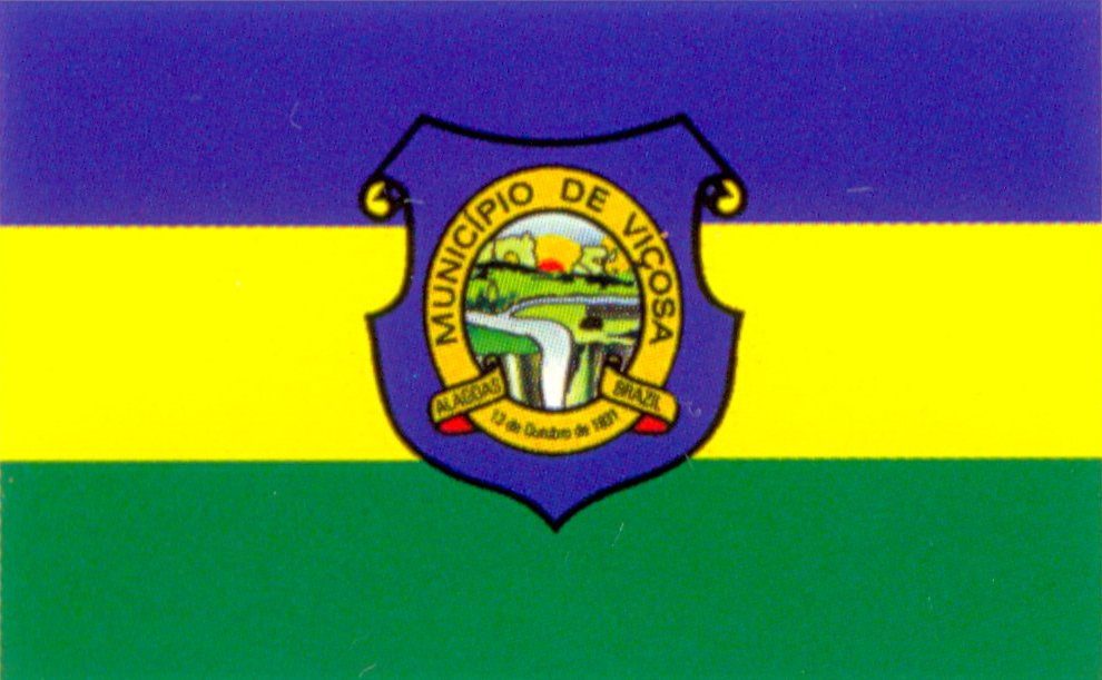 bandeira de viçosa al